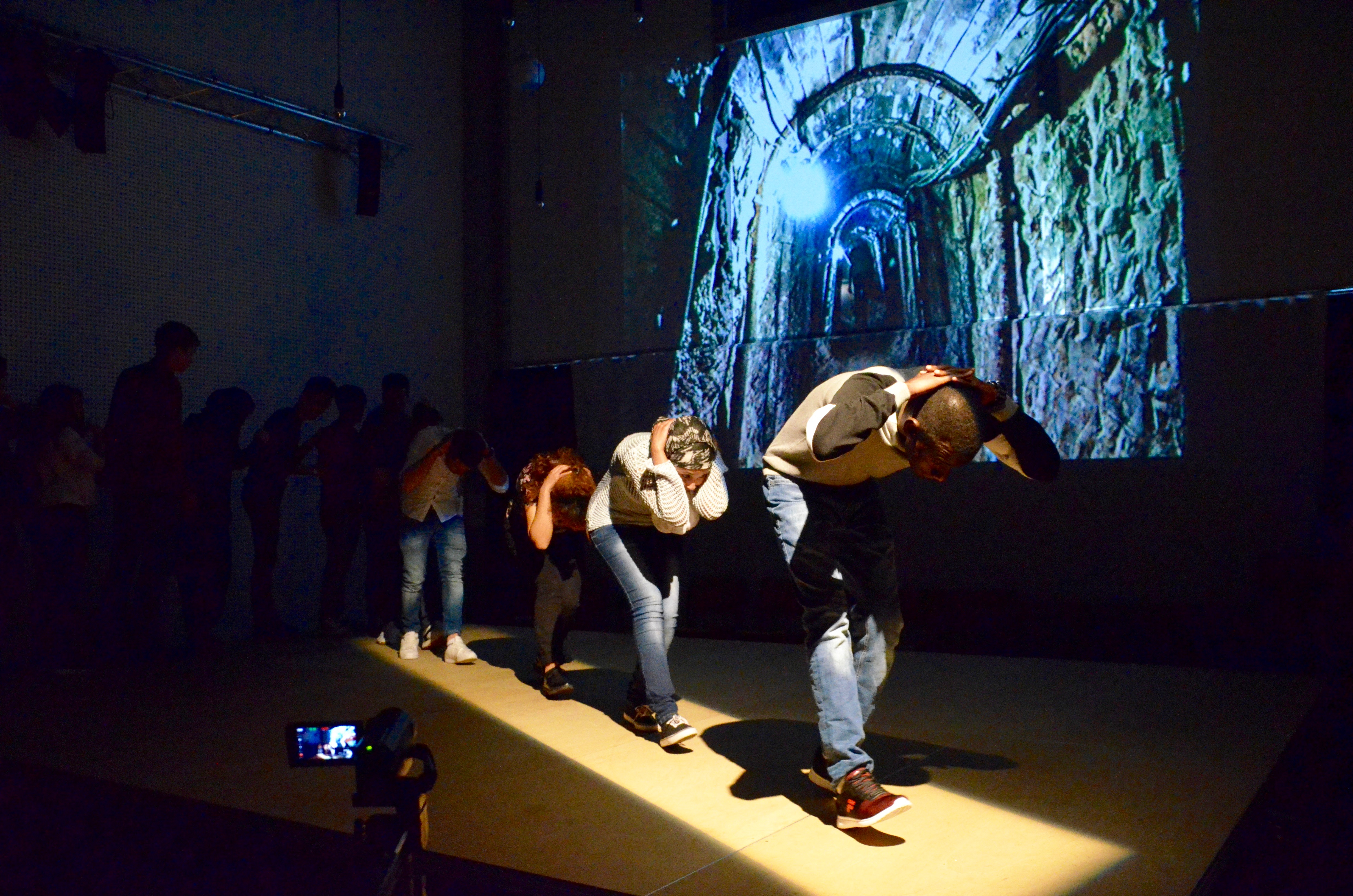 Dies ist ein Szenenfoto aus dem Theaterstück "Meine Freiheit - Deine Freiheit". Es wurde am 12.05.2016 in Selb aufgenommen.